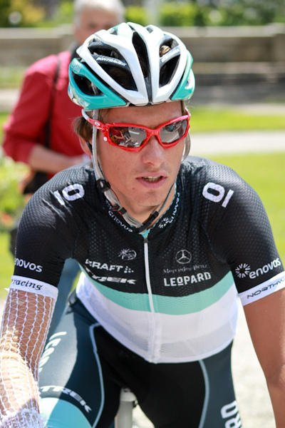 Etape 1 (Albertville) du Critérium du Dauphiné 2011